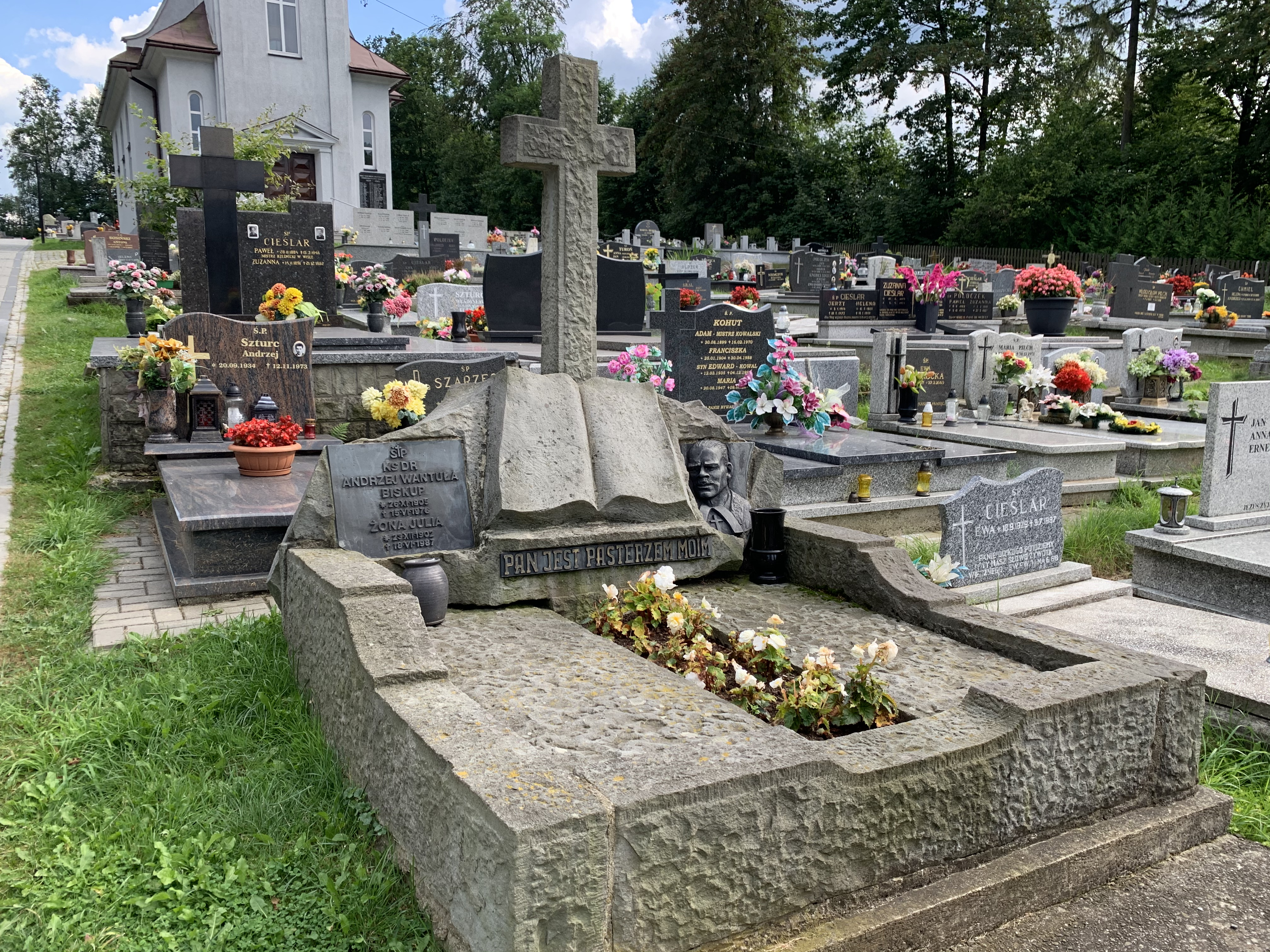 Cmentarz Na Groniczku w Wiśle - nagrobek ks. bp. Andrzeja Wantuły, proboszcza w Wiśle oraz biskupa Kościoła Ewangelicko-Augsburskiego w PRL.